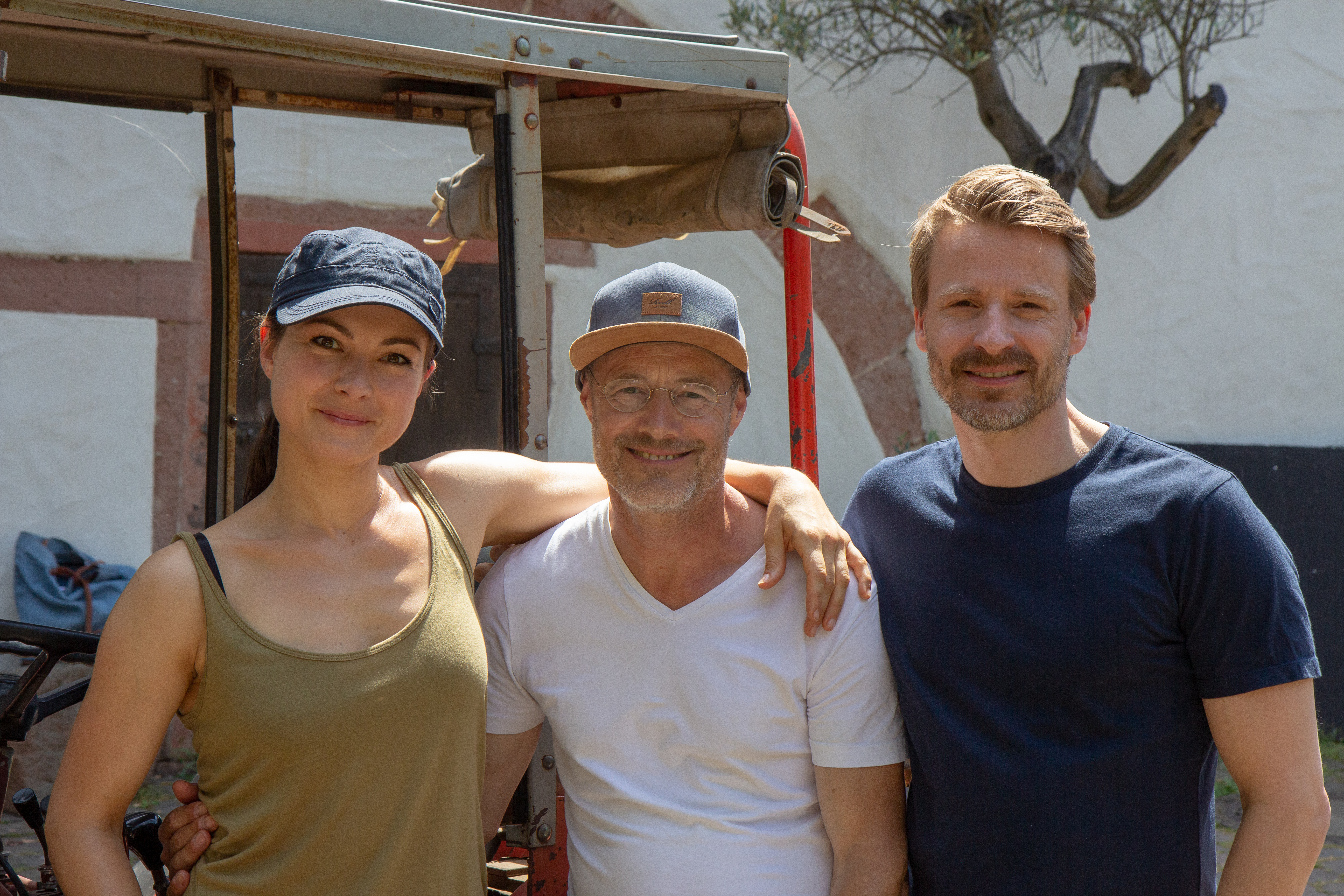 Foto- und Interviewtermin am Set von „Weingut Wader - Das Familiengeheimnis".